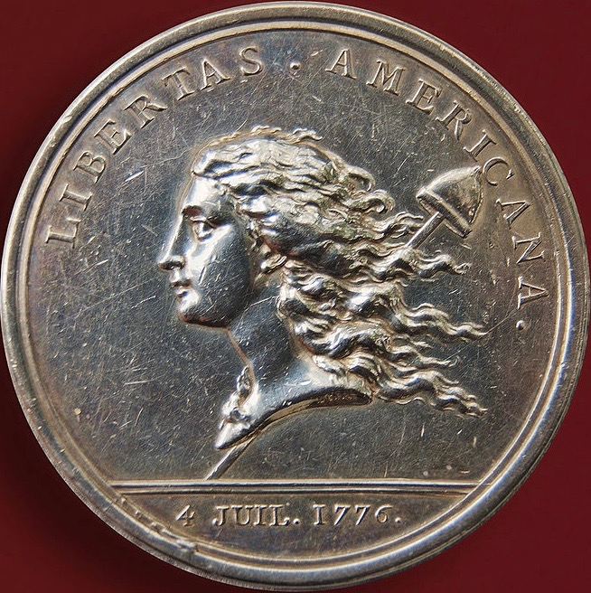 Augustin Dupré (1748–1833) nach Esprit-Antoine Gibelin (1739–1813): Vorderseite einer auf Wunsch Benjamin Franklins (1706–1790) geprägten Medaille auf den Frieden von Paris (3. September 1783), der den Amerikanischen Unabhängigkeitskrieg beendete, mit Kopf der personifizierten Freiheit Amerikas ("Pax Americana"), phrygischer Mütze auf Pfahl und Datum der Unabhängigkeitserklärung der Vereinigten Staaten (4. Juli 1776).